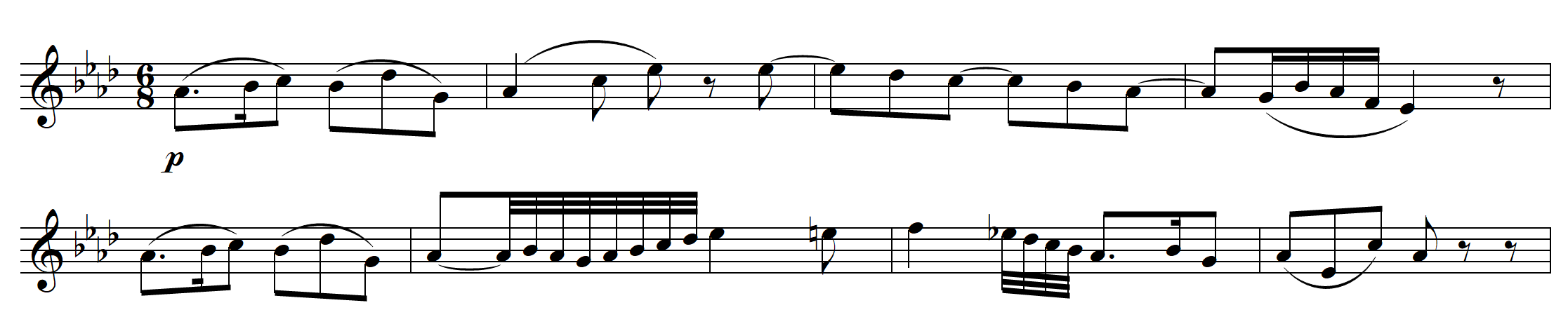 Hauptthema 2. Satz des Trompetenkonzerts von Haydn